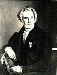 Scan eines alten Familienporträts von André Joseph Francois de Grand Ry (1780-1849), Bürgermeiser von Eupen und Besitzer von Schloss Weims und Schloss Lontzen